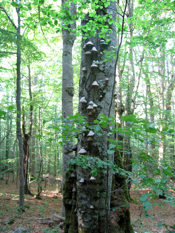 Gljiva iz Biogradske gore